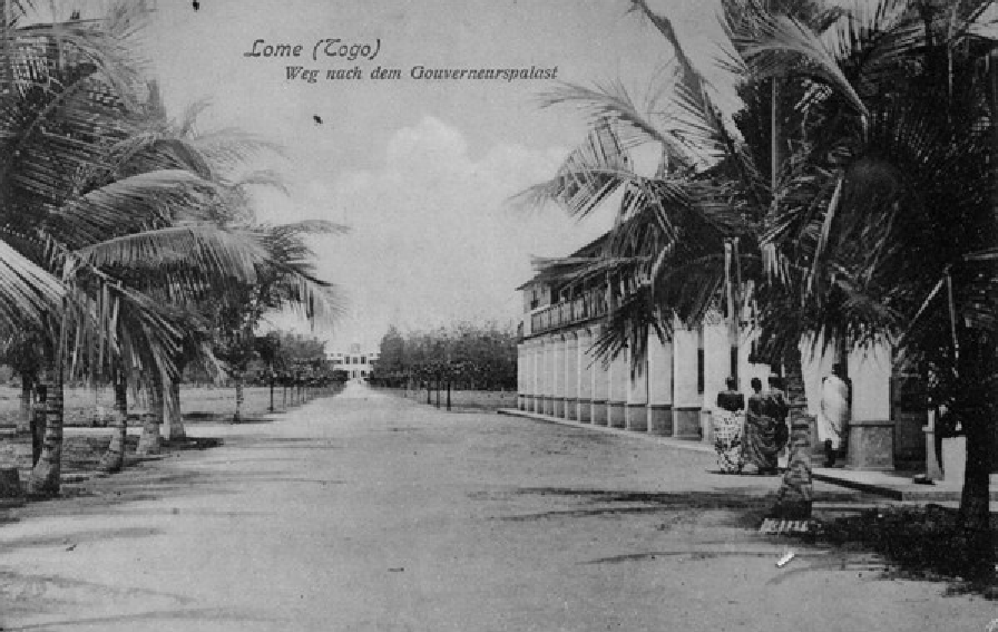 Lomé, weg nach dem Gouverneurspalast. � L�allée menant au Palais du gouverneur. Le gouverneur August Kohler (1858 � 1902), qui était arrivé au Togo en 1895, décide de construire le Palais et en choisit l�emplacement, à 250 mètres de la plage. La ville de Lomé compte alors 2084 habitants, dont 31 Européens. La construction, entreprise sans plan ni financement dès 1897, s�interrompt et reprend plusieurs fois, pour s�achever entre1905 et 1906 sous la direction de E. Schmidt, le premier architecte employé par l�administration coloniale allemande. Pour que l�ensemble de l�édifice puisse être vu depuis les navires en mer, et ce malgré un talus qui bordait le rivage, le bâtiment reçu un soubassement de 3,50 m. Sur la façade est, débouche deux avenues, Franz-Fredrichstrasse et Wilelmstrasse, l�actuelle avenue A. Sarraut qui va parallèle à la plage. La façade sud est tournée vers la mer. A la même époque, quelques maisons d�habitation, destinées aux fonctionnaires, sont construites aux abords immédiats du Palais. � Cette carte postale, dont le verso n�est pas divisé pour séparer l�adresse de la correspondance comme cela fut recommandé par l�Union postale à partir de 1904, doit dater de cette année, soit avant l�achèvement du Palais.